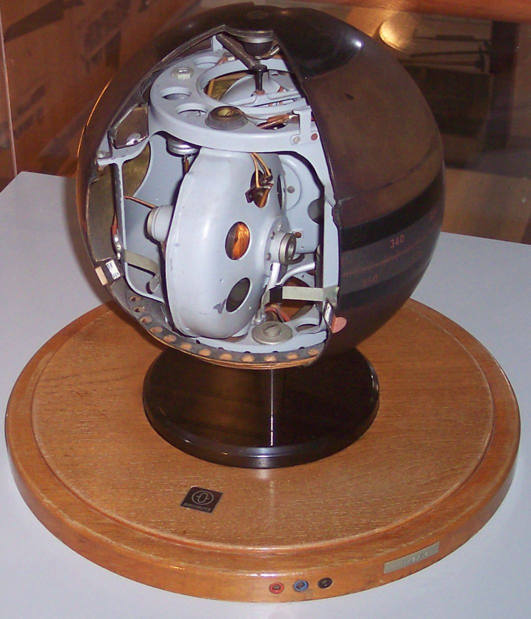 Kreiselkompass der Fa. Anschütz im Schnitt